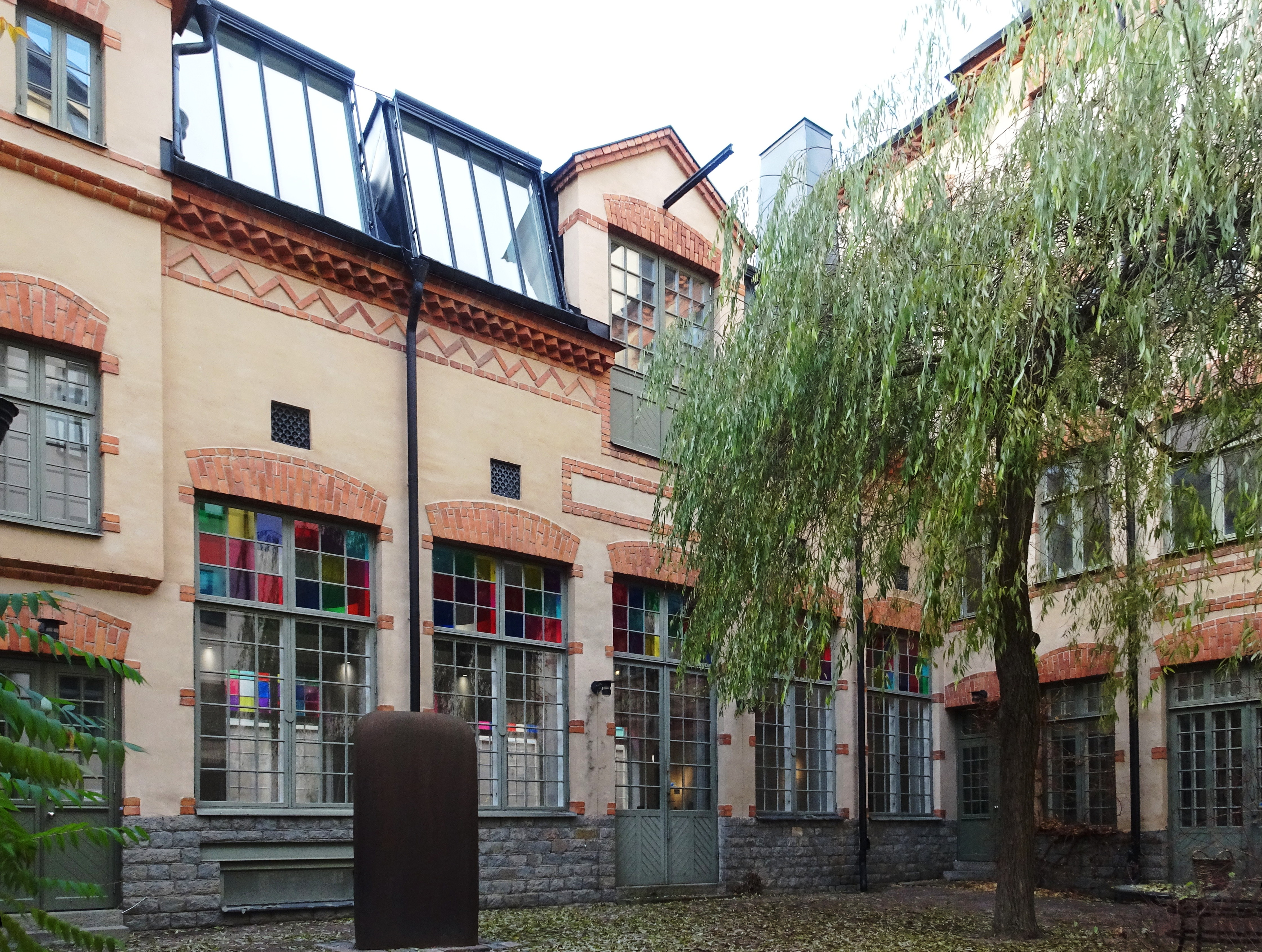 Otto Meyers gjuteri, Västmannagatan 81A